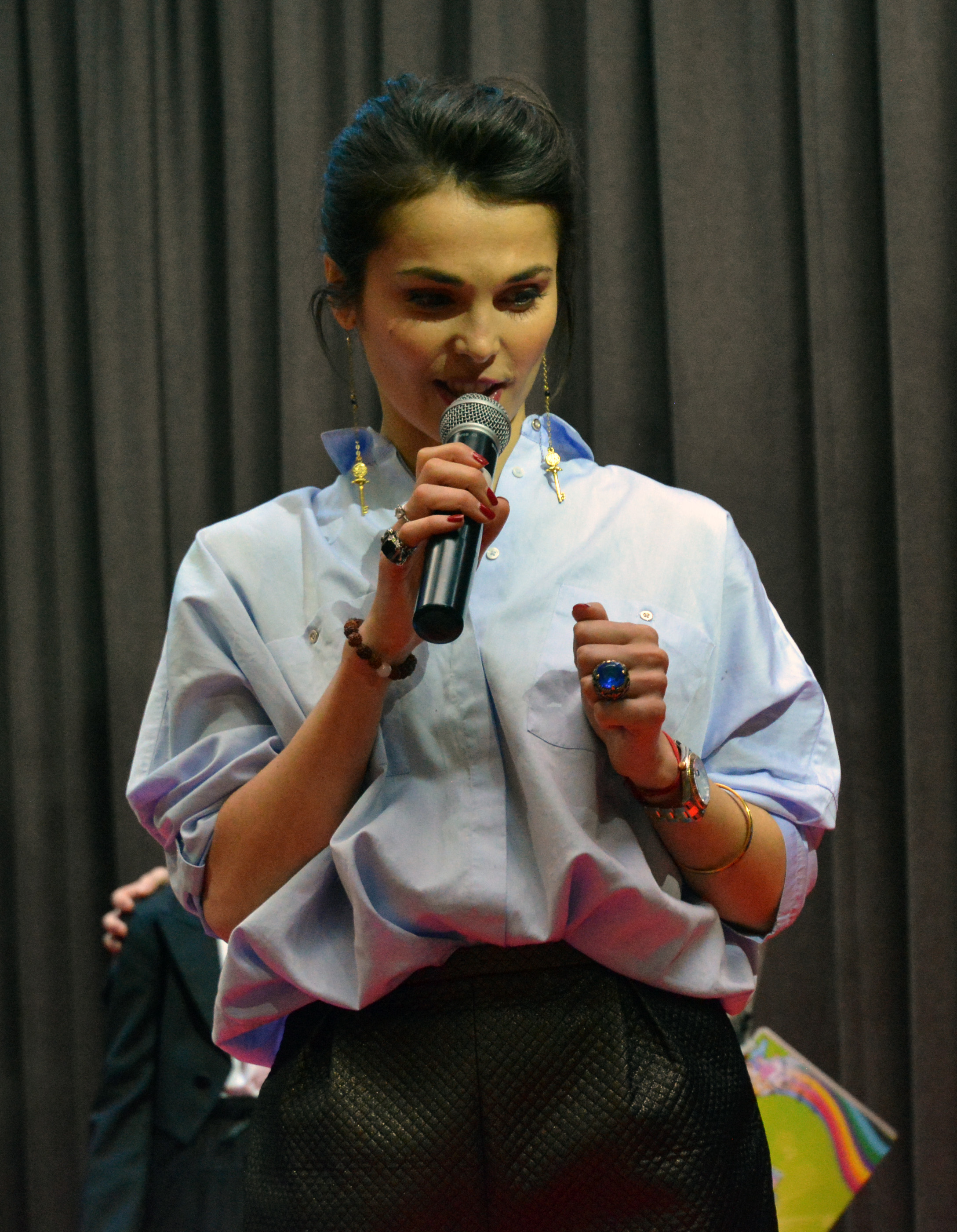 Сати Казанова на вечеринке New Wave Junior Party (клуб Maxim Bar)